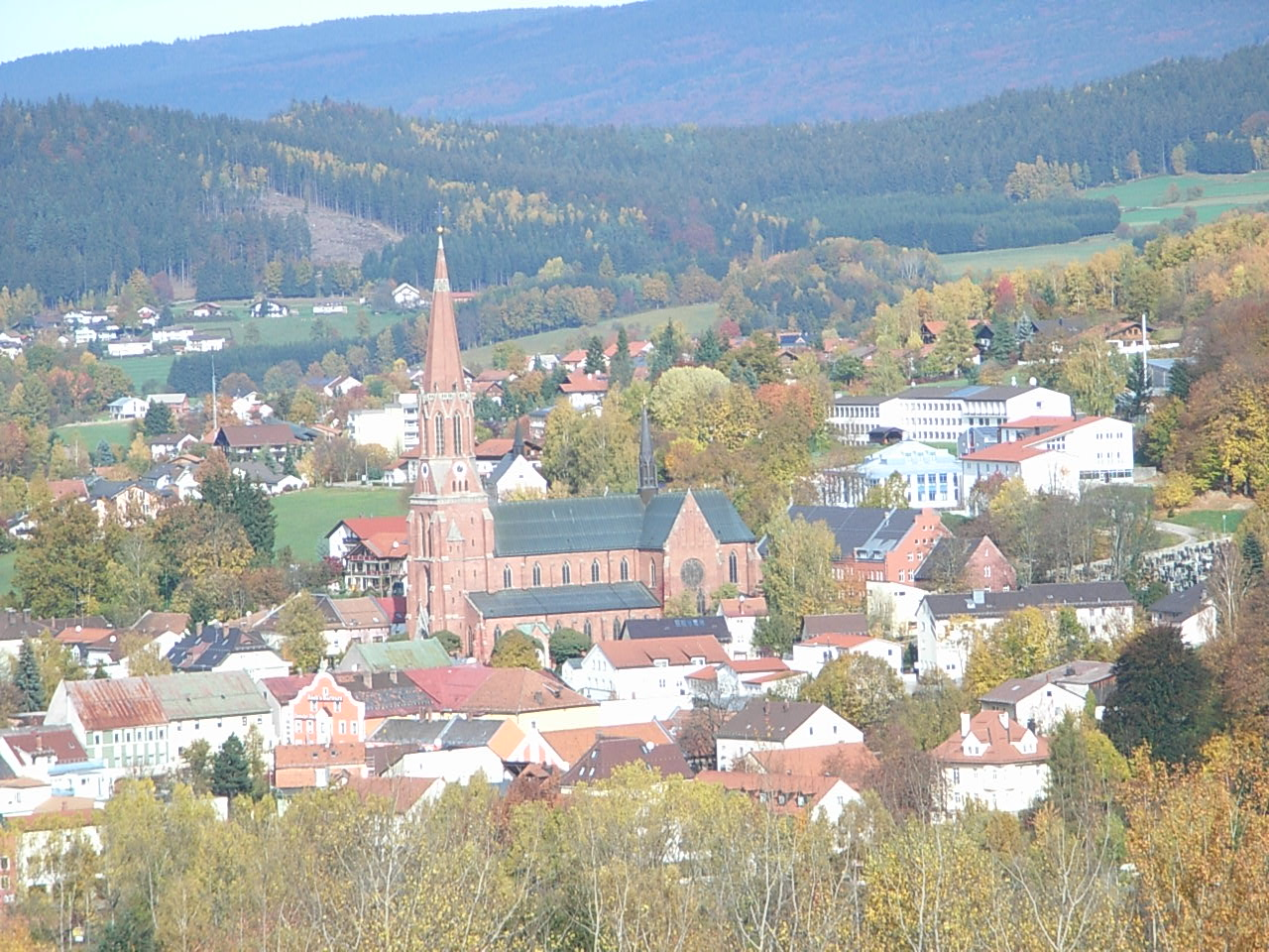 Beschreibung: Zwiesel mit Pfarrkirche St. Nikolaus Quelle: Bild selbst erstellt Datum: 26. Oktober 2006 Autor: Konrad Lackerbeck